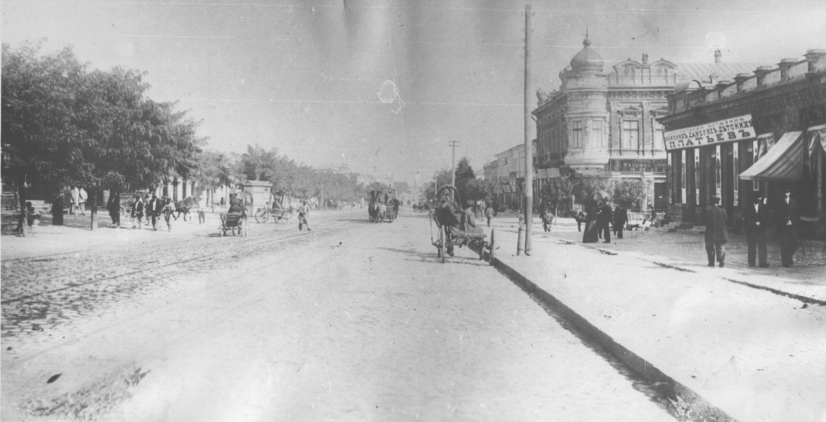 Херсонская улица в Николаеве